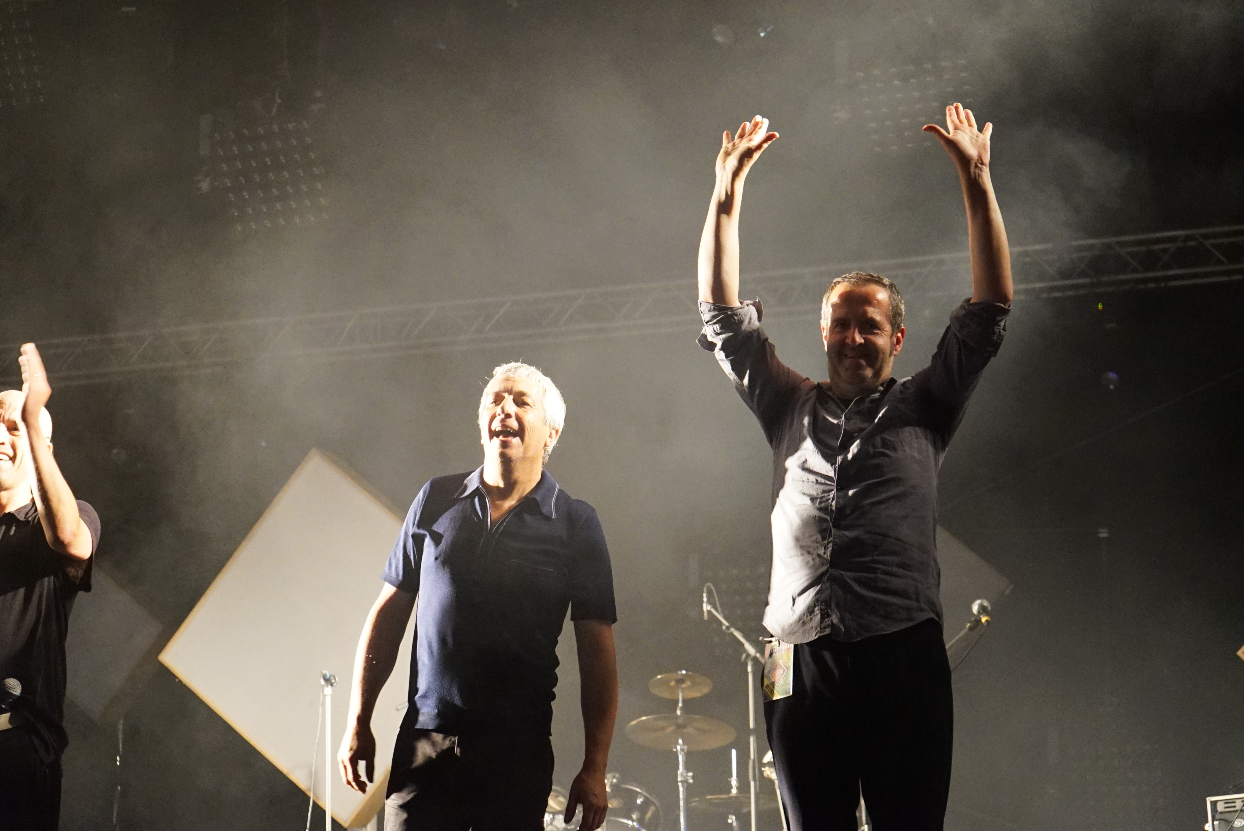 lors de un été dans l'Aisne 2015 Laon.